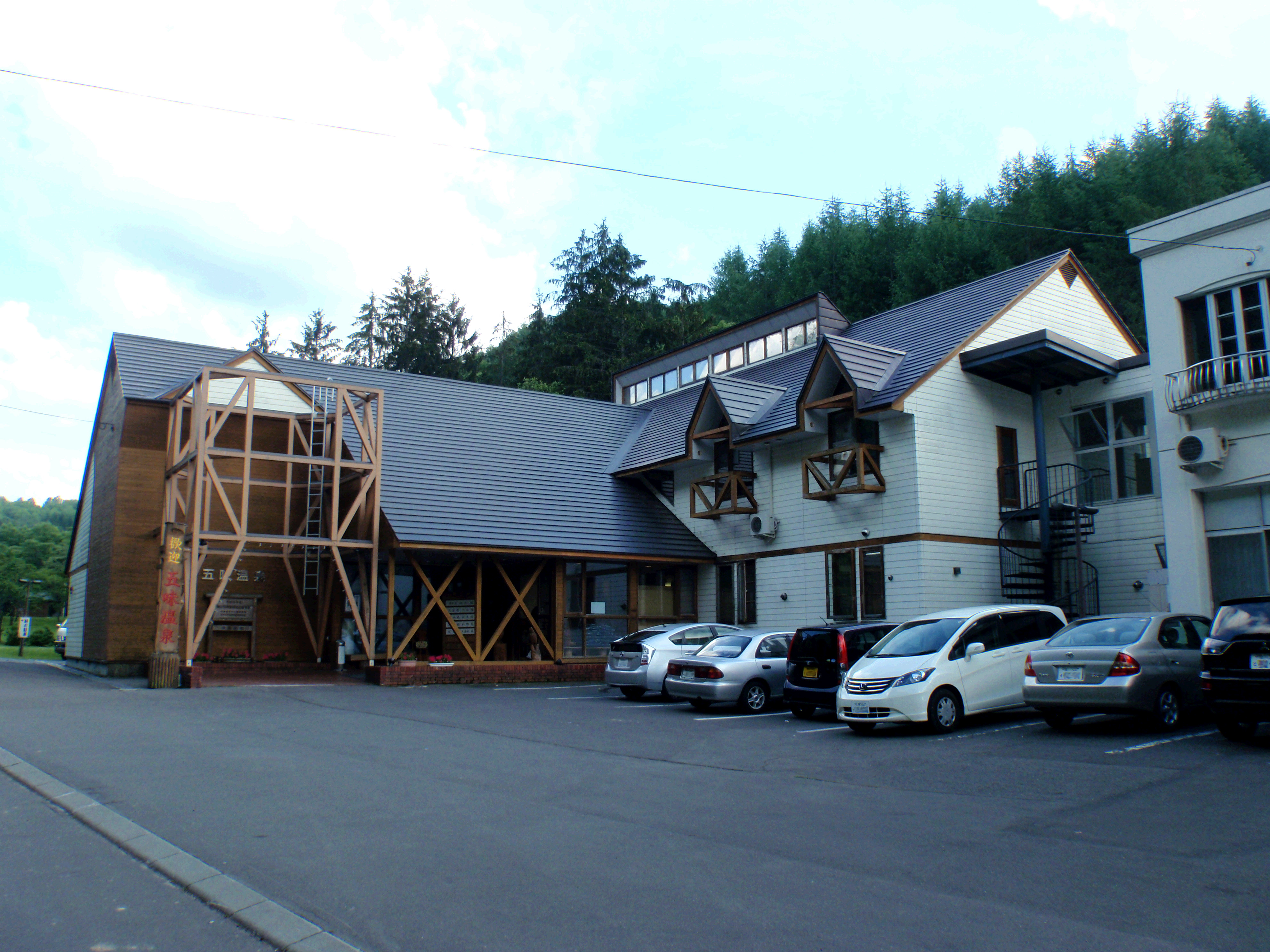 五味温泉